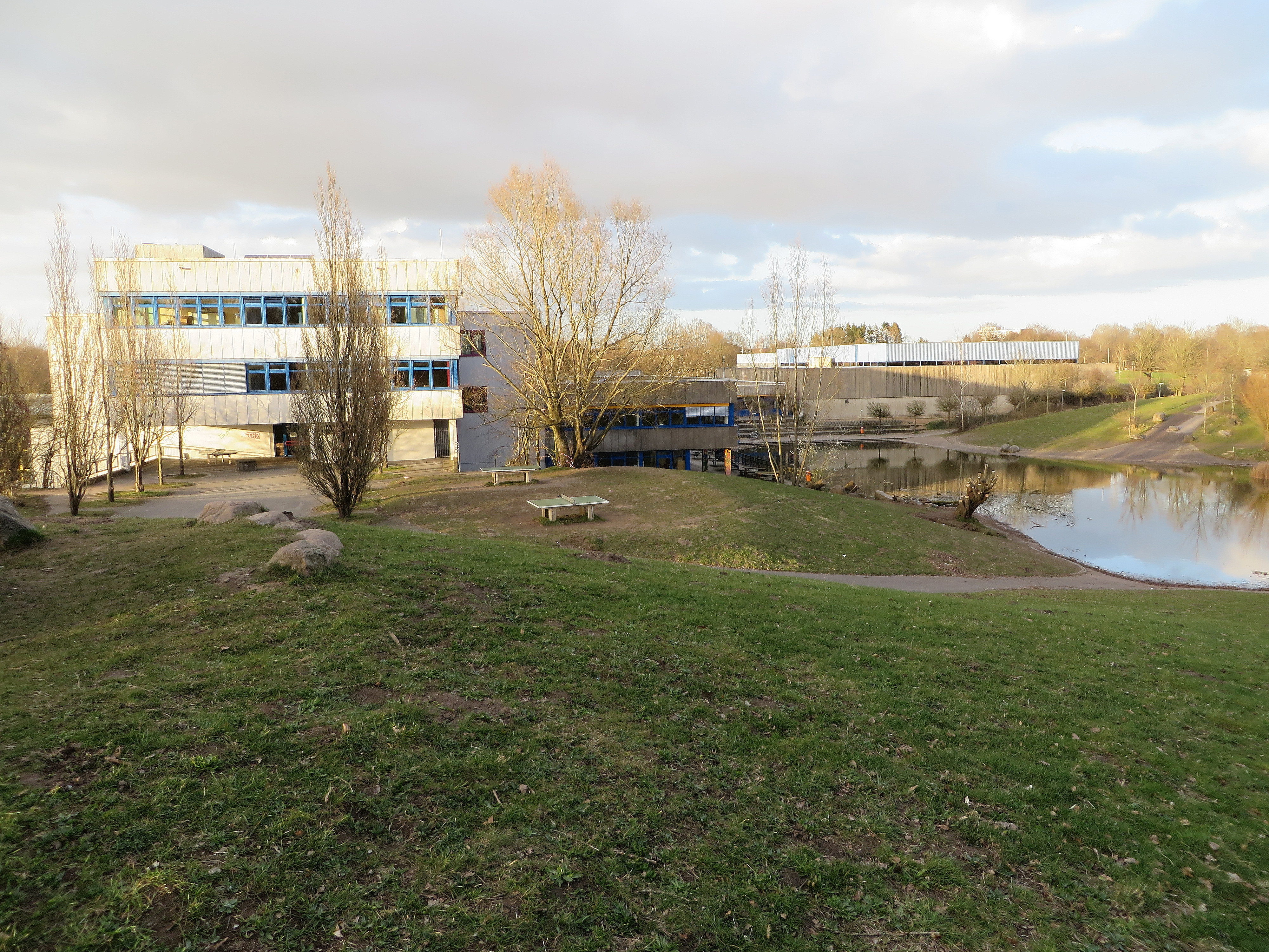 Kooperative Gesamtschule Flensburg-Adelby (KGS Adelby) – Wo die alte Fassade noch gut erkennbar ist, Bild 01